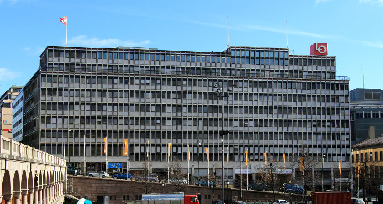 Folkets hus, Youngs gate 11, Oslo, Norway.